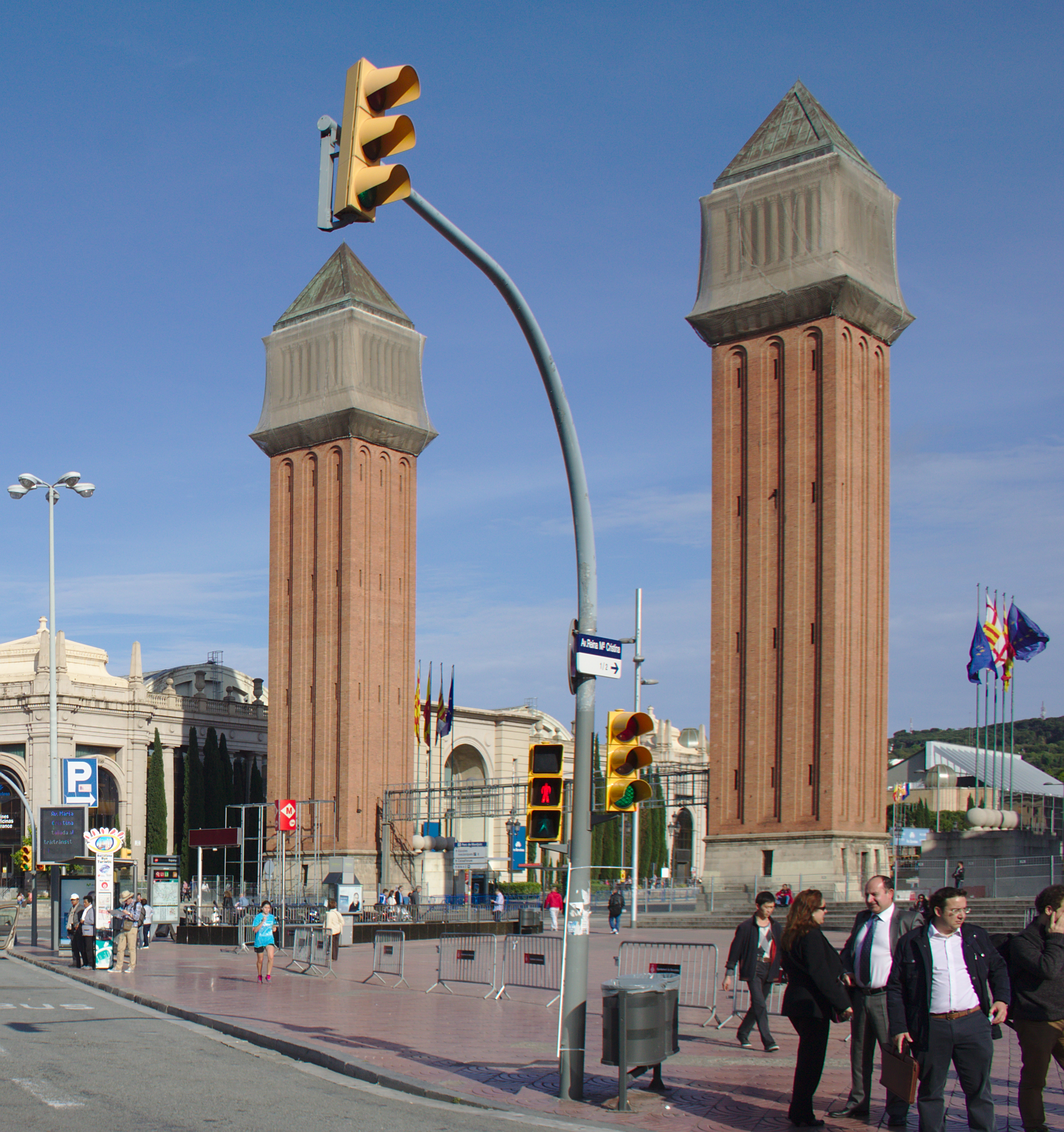 Venezianische Türme, Plaça d'Espanya, Barcelona